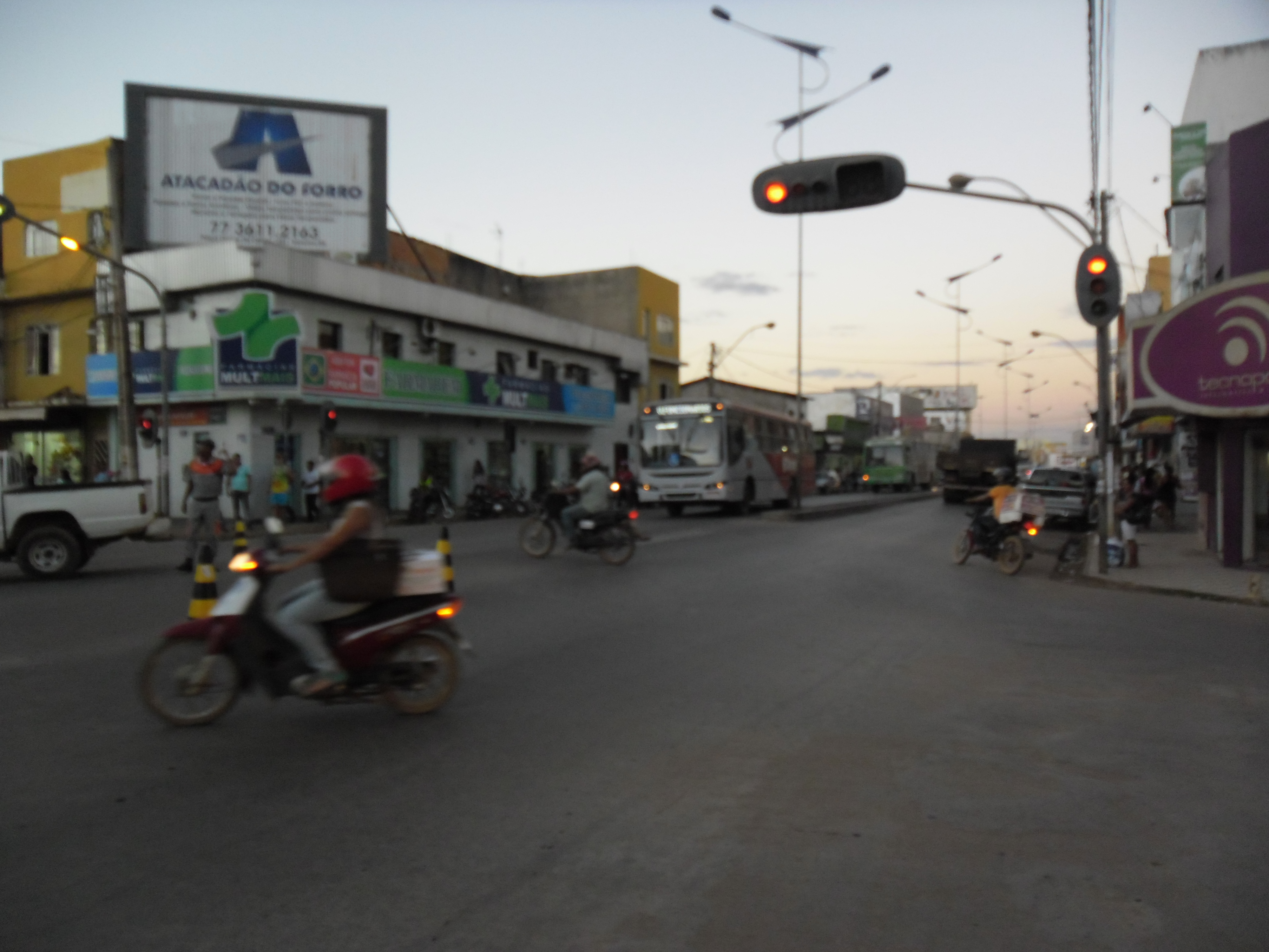 barreiras ba